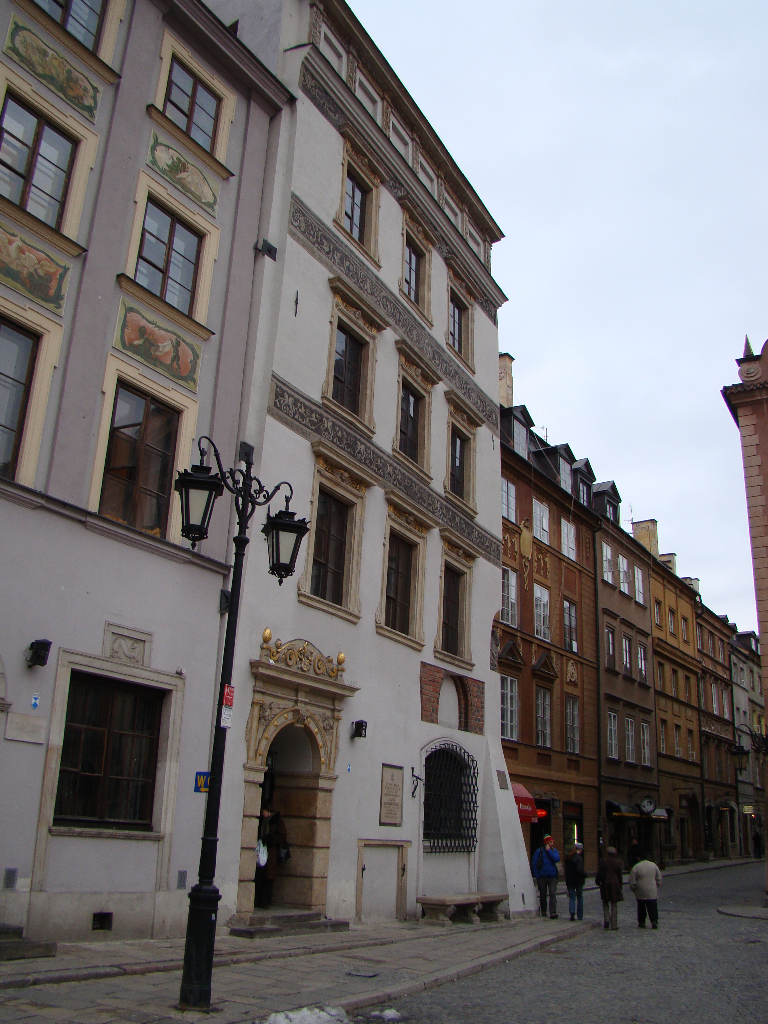 Kamienica pod św. Anną